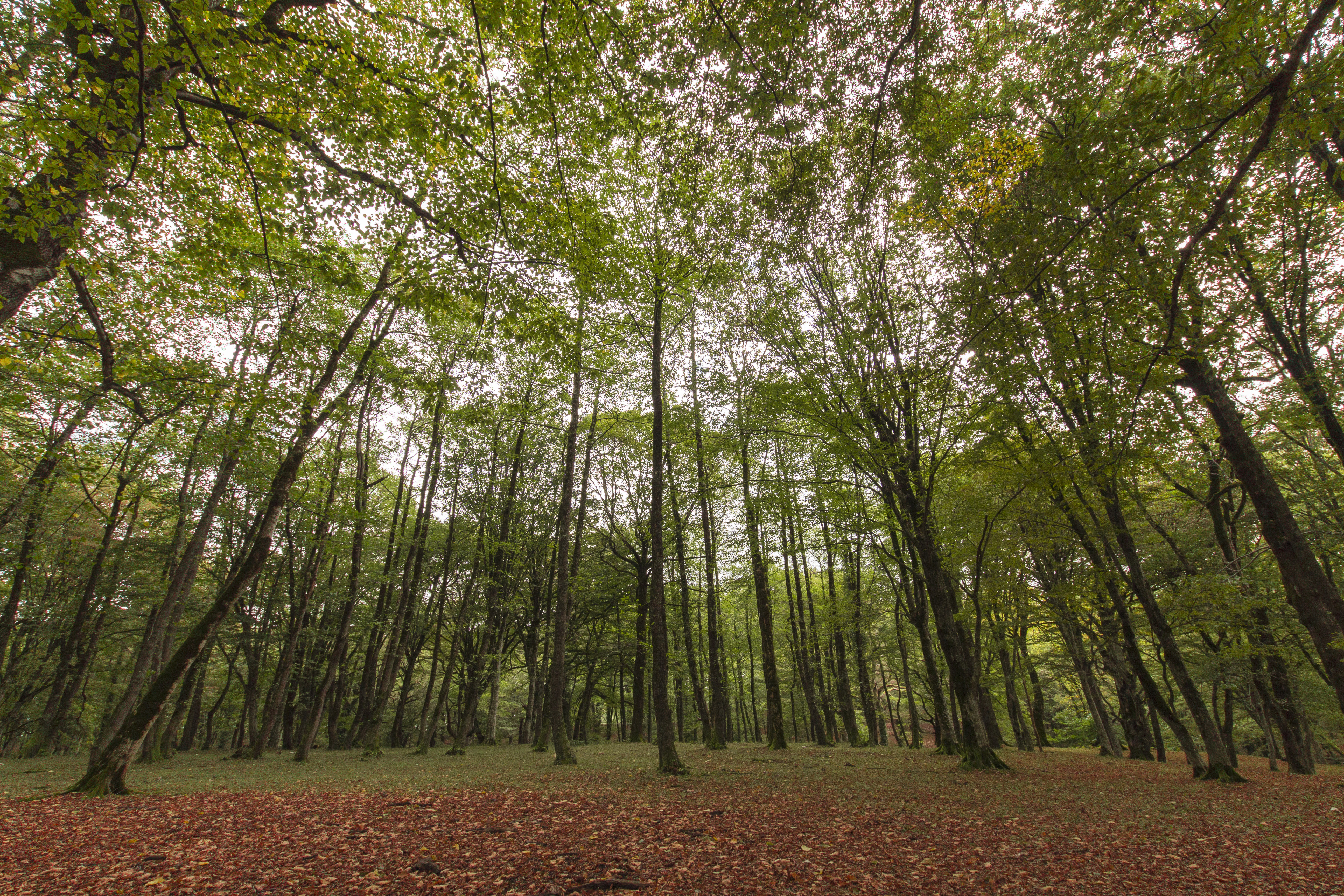 აჯამეთის აღკვეთილი მდებარეობს ქუთაისიდან 15 კილომეტრის დაშორებით, მდ. რიონის მარცხენა შენაკადებს, ყვირილასა და ხანისწყალს შორის.